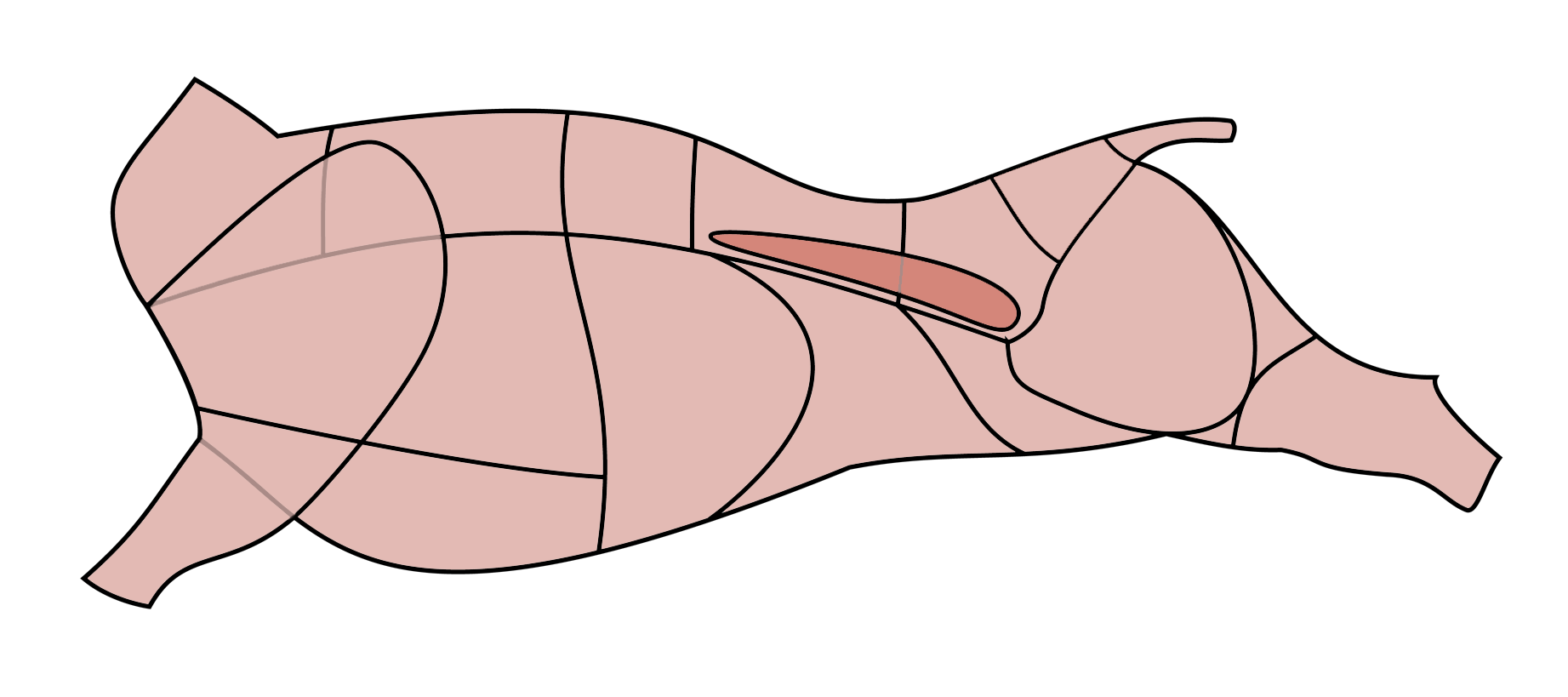 RinderFilet.